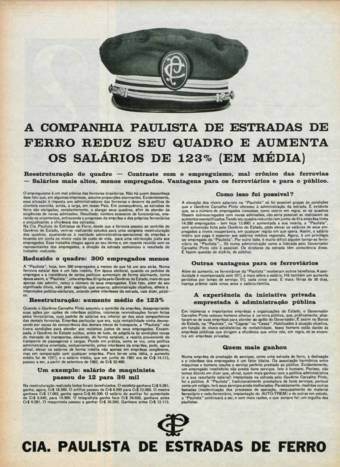 Propaganda publicada pela recém estatizada Companhia Paulista de Estradas de Ferro ressaltando as vantagens da estatização promovida no ano anterior. Posteriormente essas vantagens foram perdidas e a empresa acabou absorvida pela nova estatal Fepasa e demitindo milhares de empregados e congelando salários por anos.